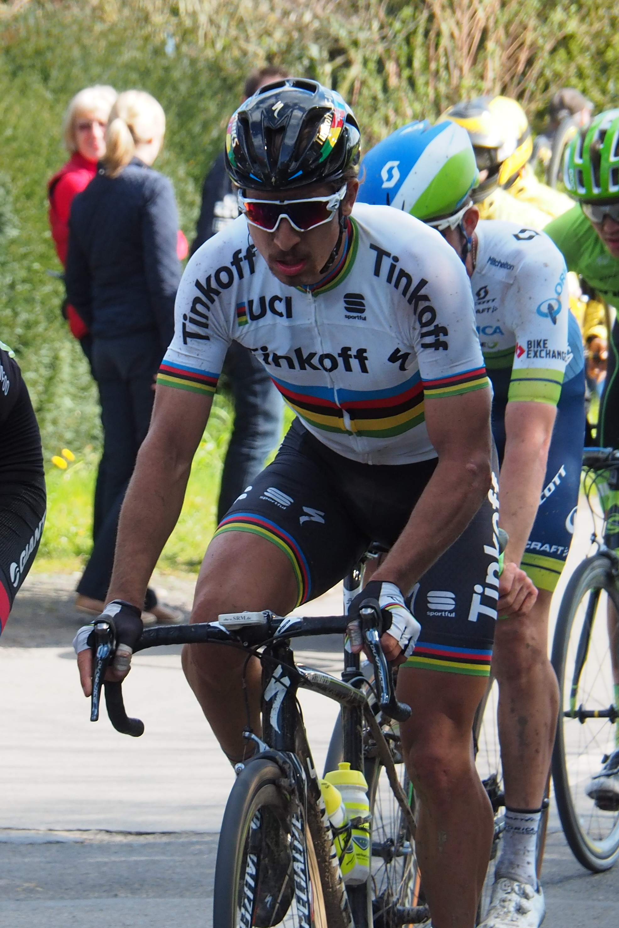 Paris-Roubaix 2016, à 8 km de l'arrivée : à droite, Peter Sagan, à gauche probablement Ramon Sinkeldam (à confirmer)